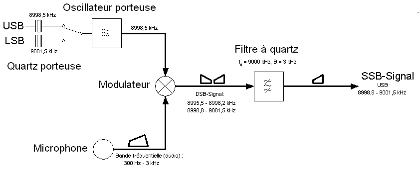 Schéma de réalisation d'un signal Bande Latérale Unique (BLU, en anglais SSB – Single-sideband modulation) modulé à 9MHz par filtrage à quartz